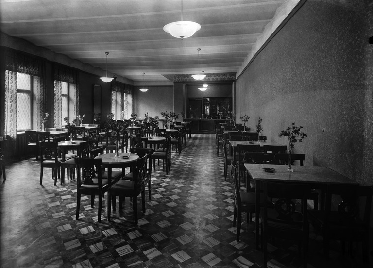 Kahvila Brondin, Bronda. Cafe, Kahvila ja Konditoria K. M. Brondin o.y , E. Esplanaadikatu 20 - Korkeavuorenkatu 36. Arkkitehdit Valter Jung ja Emil Fabritius piirsivät talon, joka valmistui 1910-luvulla. Talo purettiin 1972.